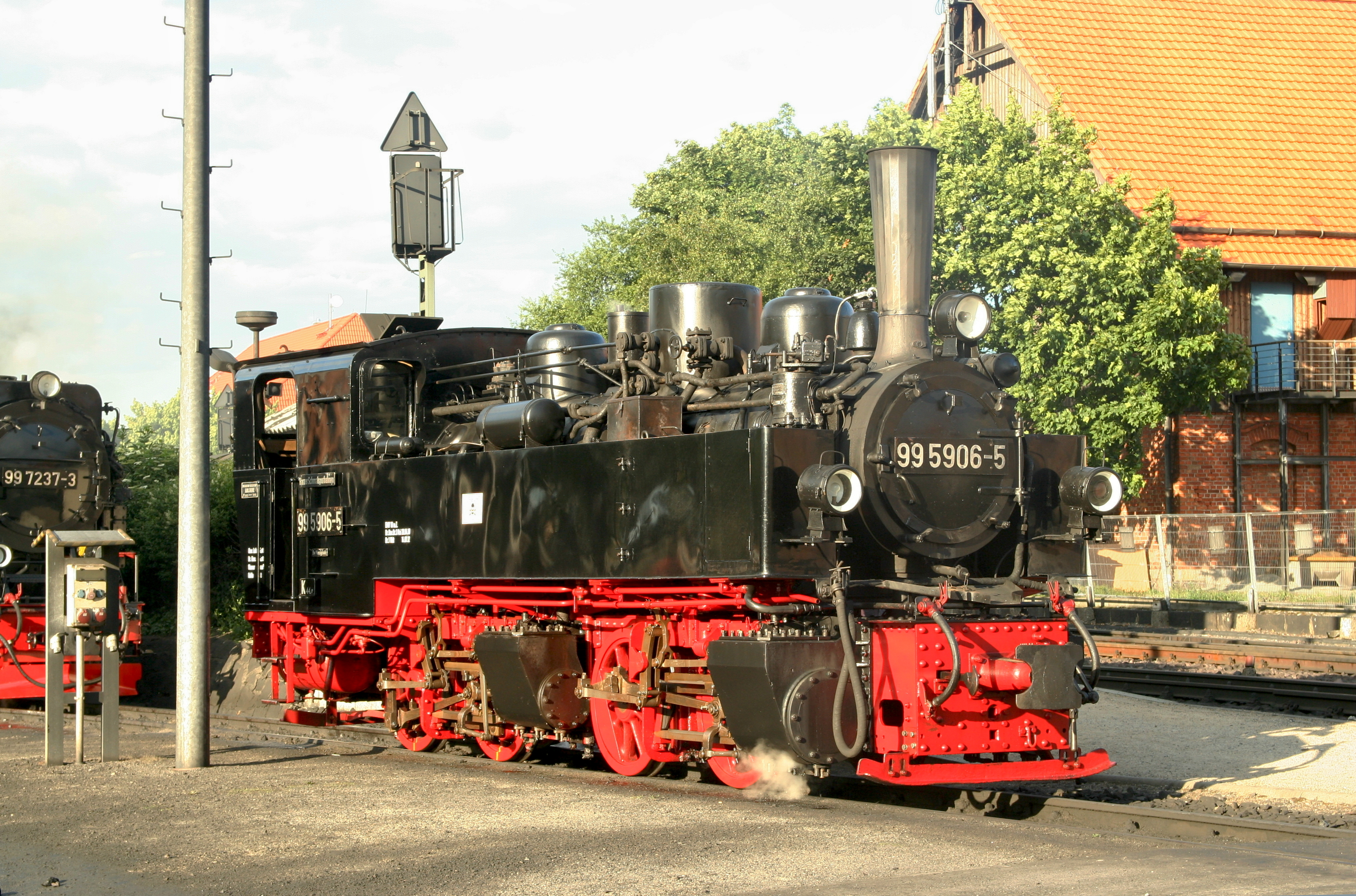 Dampflokomotive 99 5906 der HSB (ex DR 99 5906 ex NWE 41) Karlsruhe 2052/1918 B´Bn4vt in der Einsatzstelle Wernigerode am 08. Juni 2012